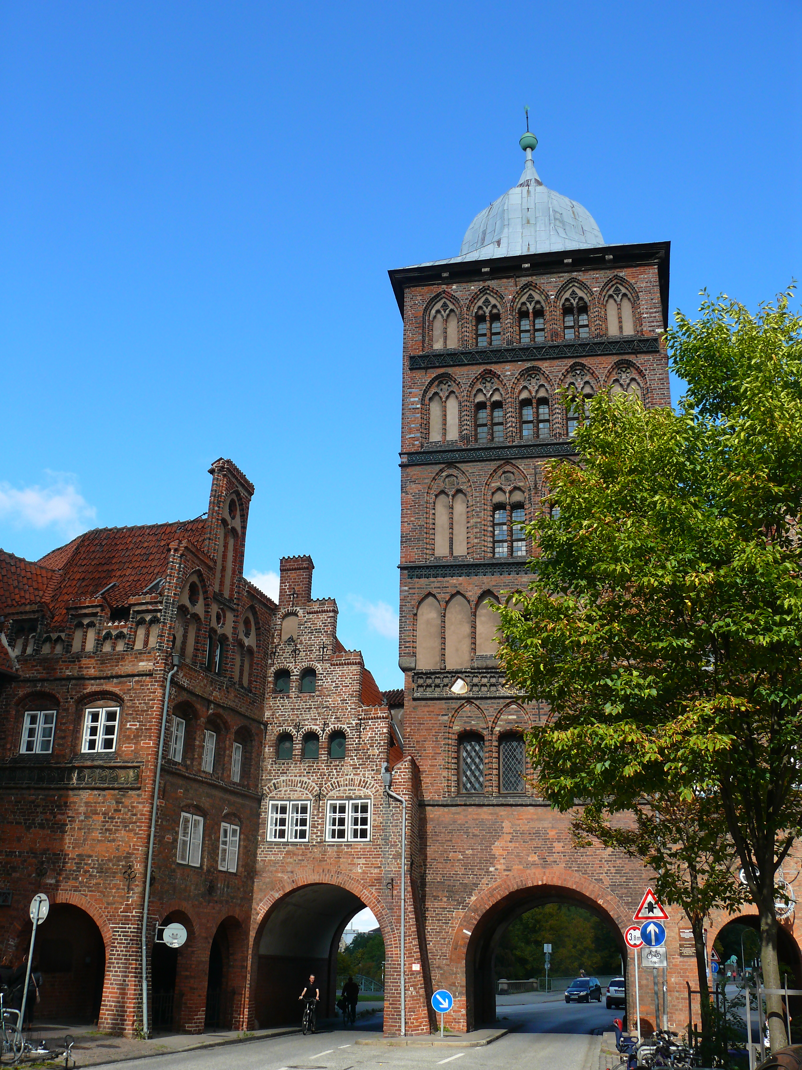 Das Burgtor zu Lübeck von der Stadtseite (Innenseite)